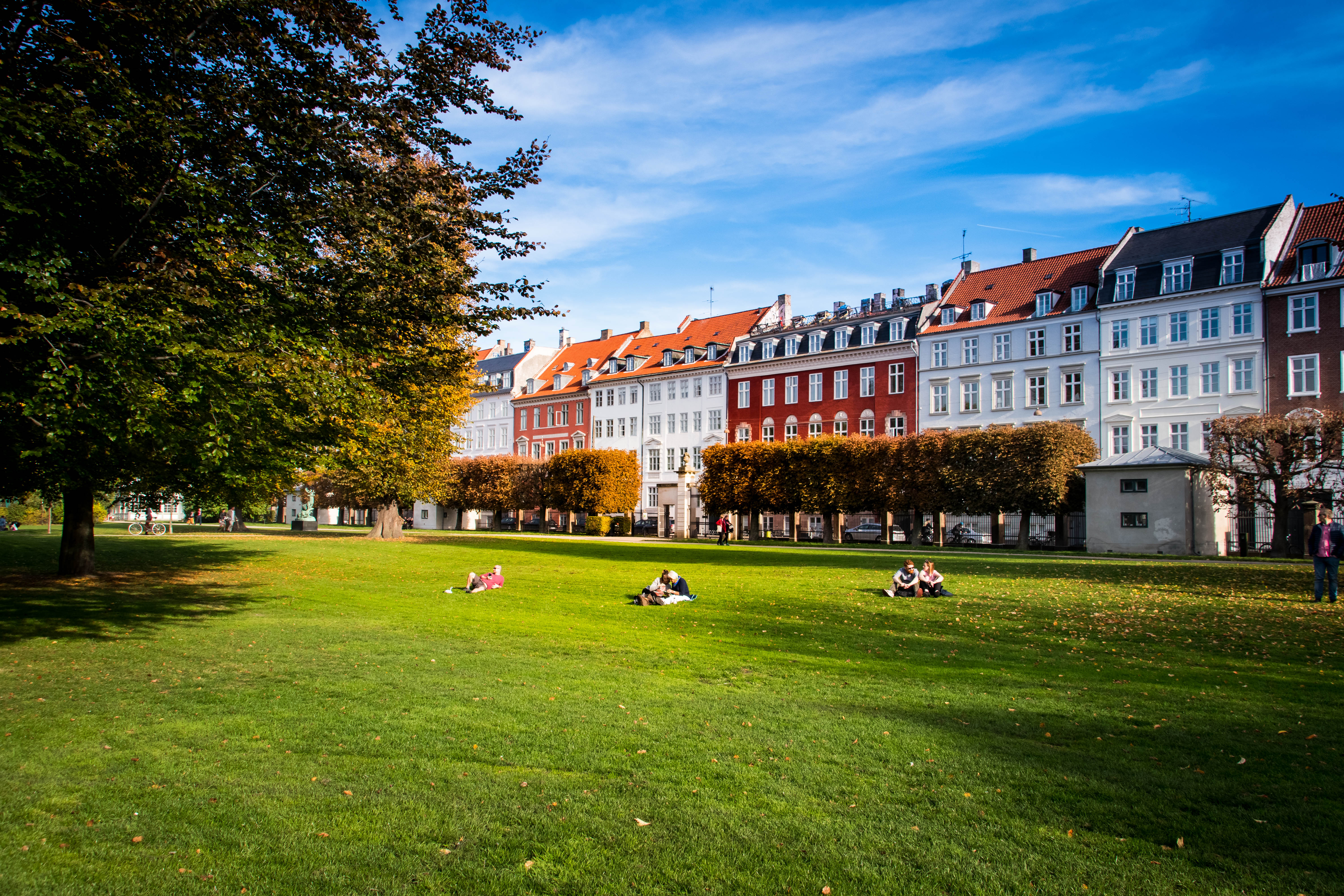 Kronprinsessegade from Kongens Have in Copenhagen, Denmark